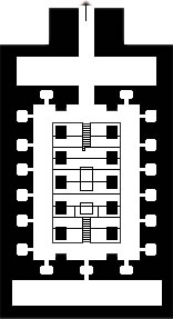 Plano del Osireion, producción propia basada en planos existentes.